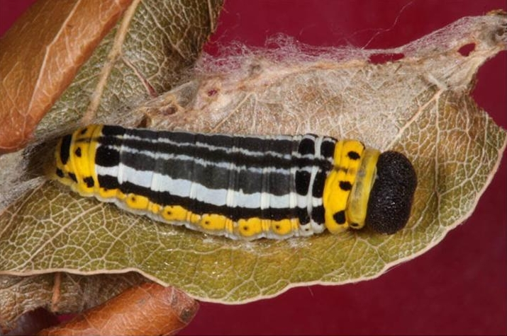 Netrocoryne repanda caterpillar